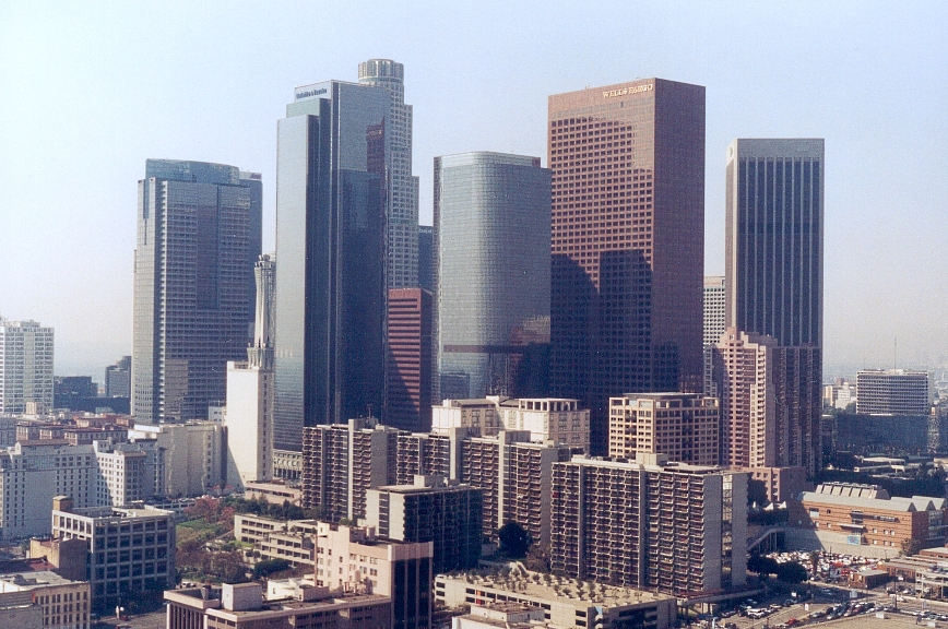 Auteur de la photographie : FC Georgio Sujet : Los Angeles downtown Année 2003